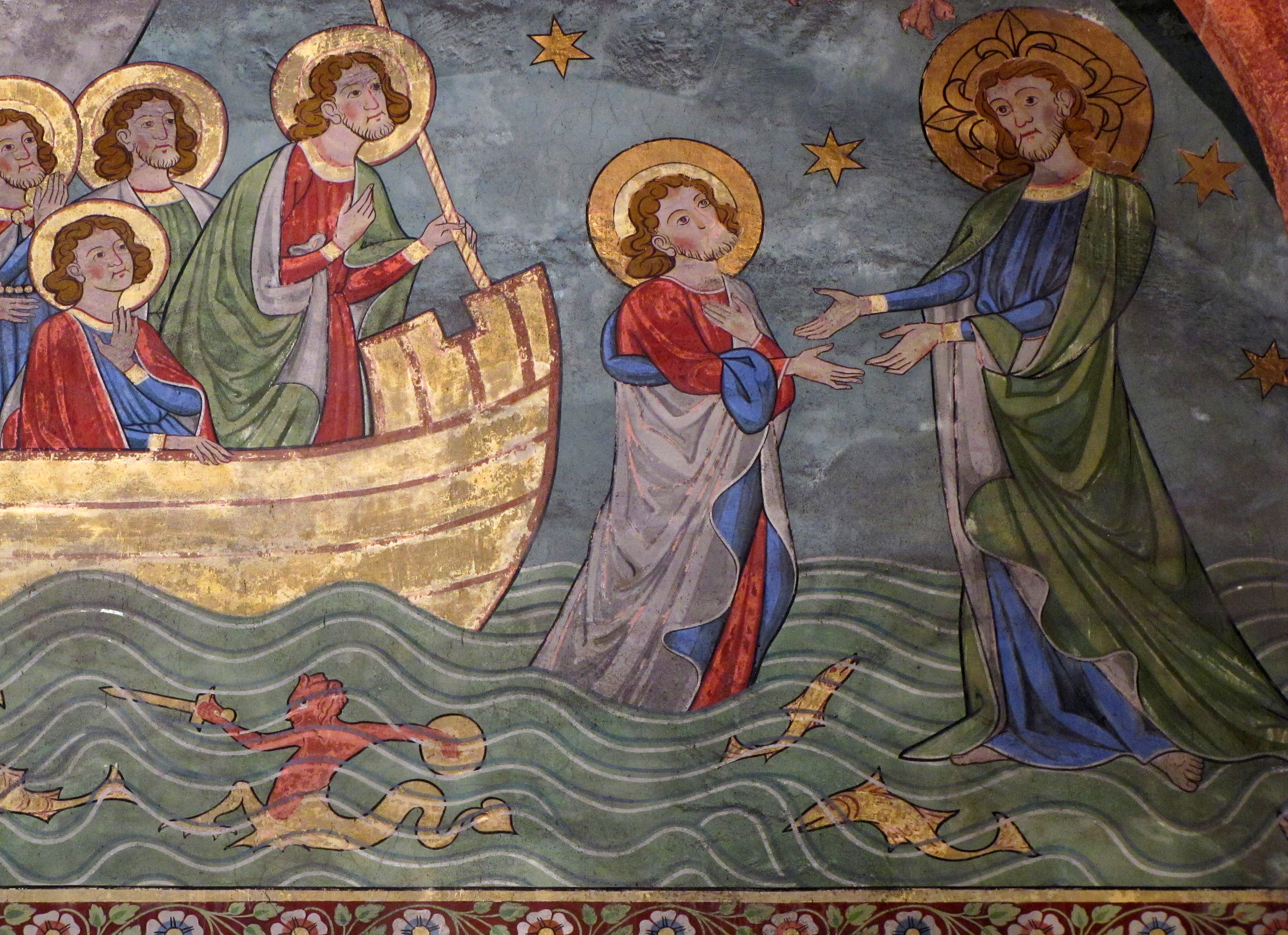 Alsace, Bas-Rhin, Strasbourg, Église protestante Saint-Pierre-le-Jeune, Détails de la fresque murale dans nef (d'après la "Navicella" de Giotto, XIXe)